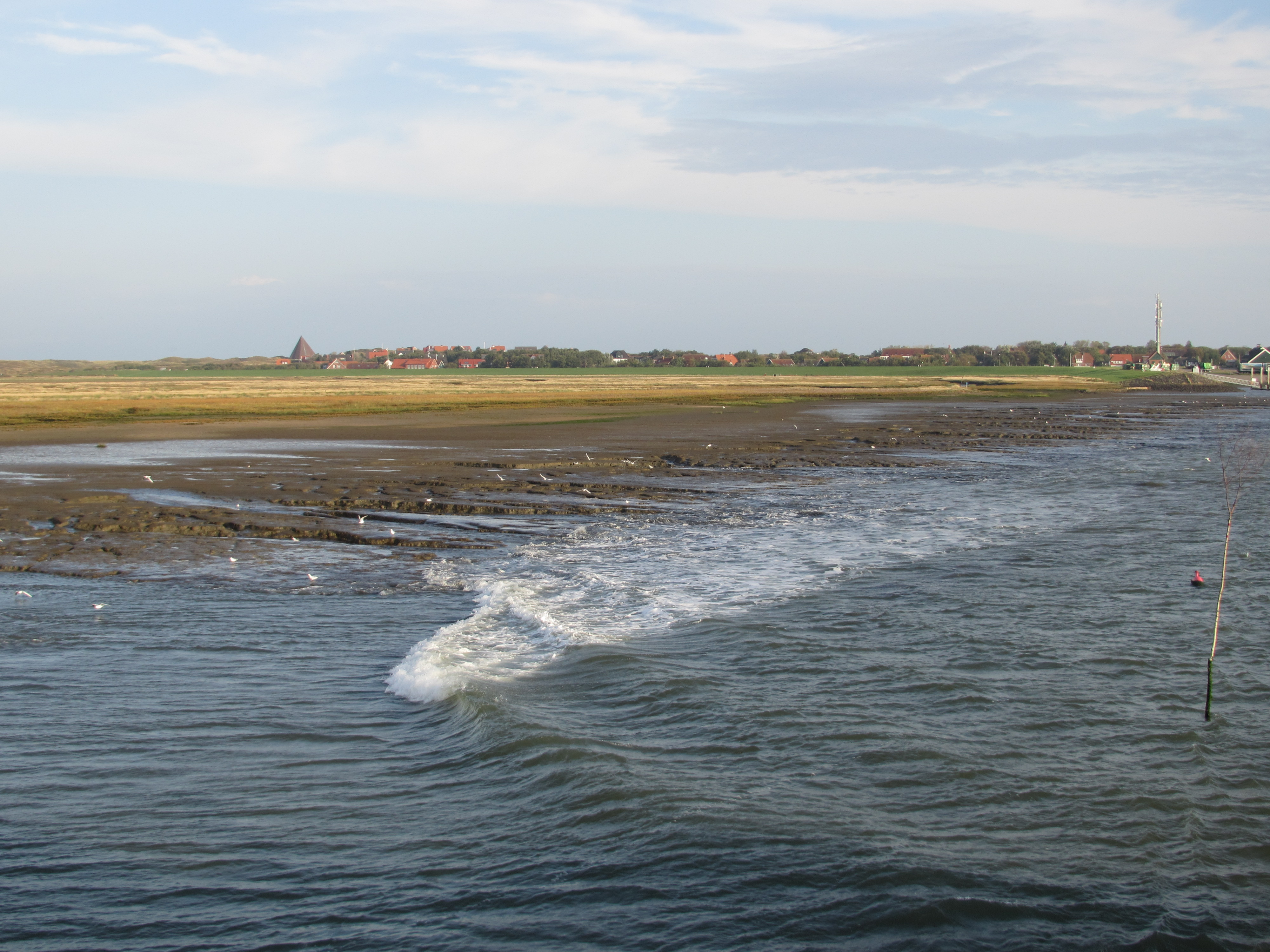 auf der Fahrt von Spiekeroog nach Neuharlingersiel, links im Bild die Dünenlandschaft im Westen des Ortes mit der zeltförmig gebauten katholischen Kirche St. Peter